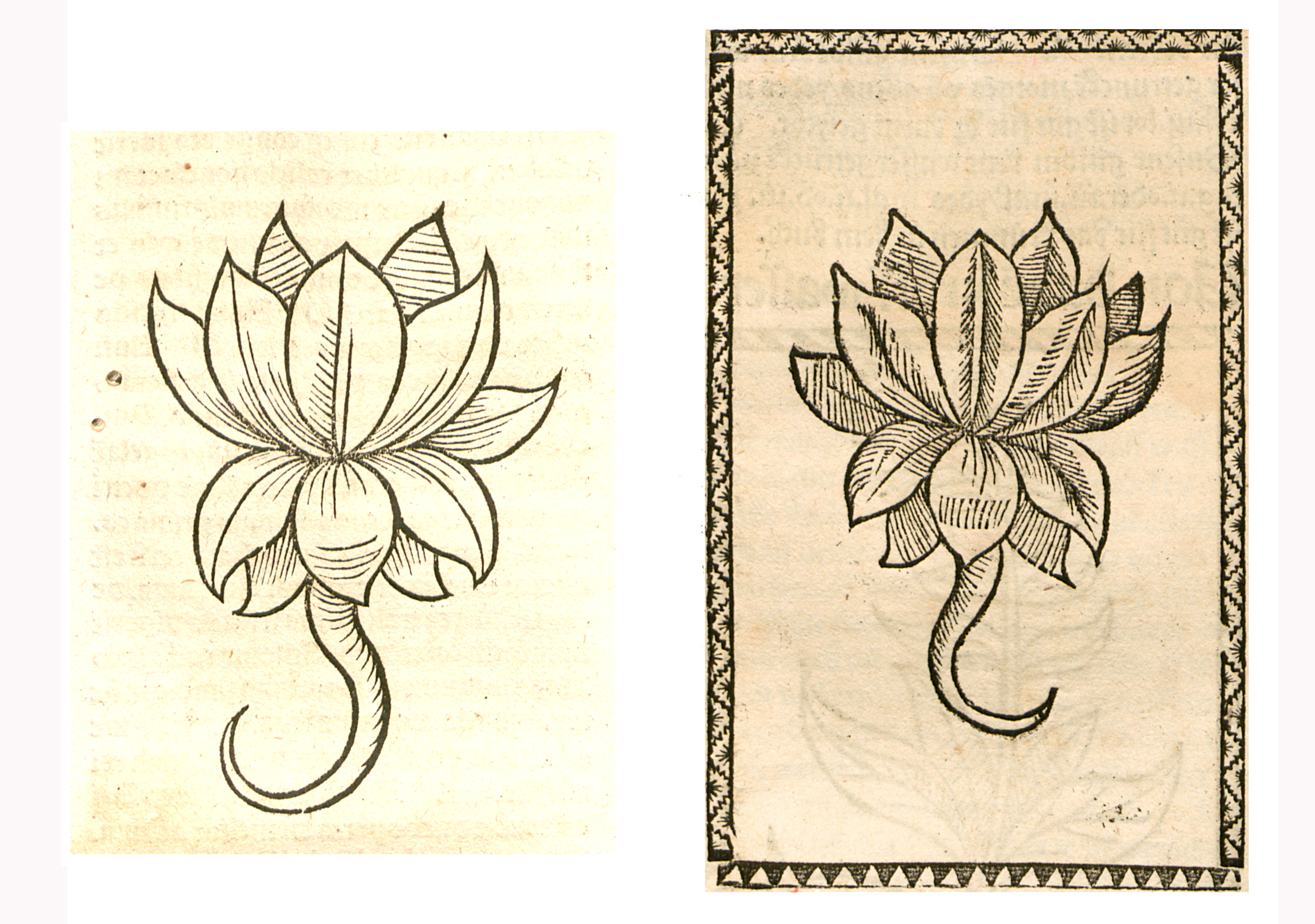 Abbildung von Cabs krut (Brassica)